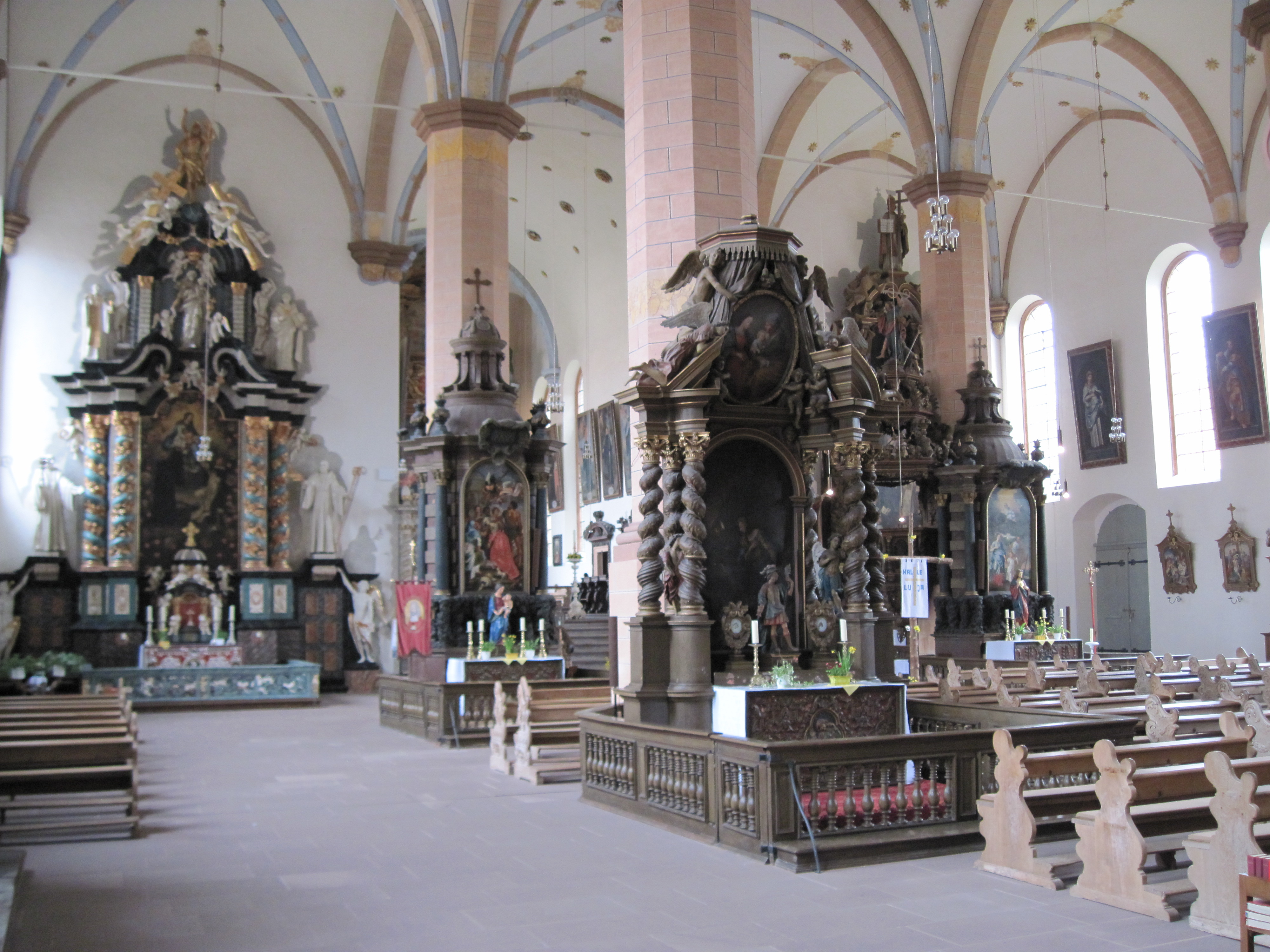 Innenraum der Klosterkirche in Lamspringe